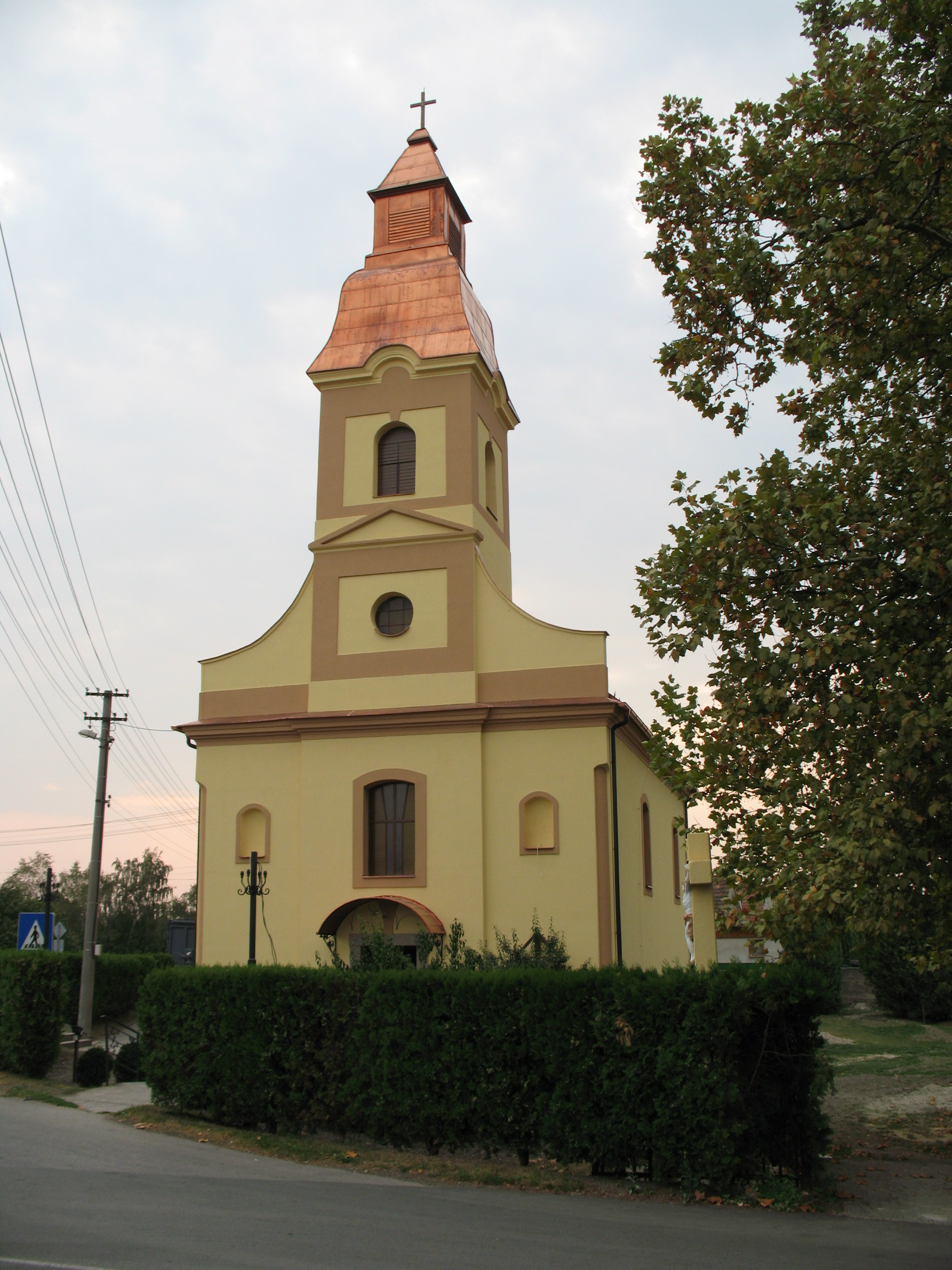 Albár templom